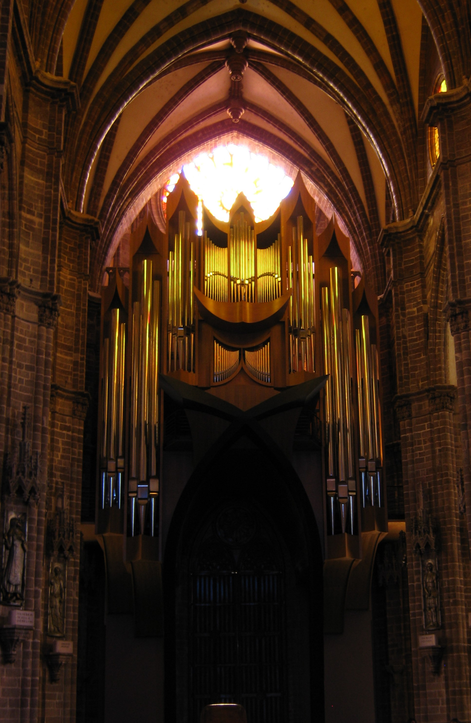 Órgano del santuario guadalupano de Zamora